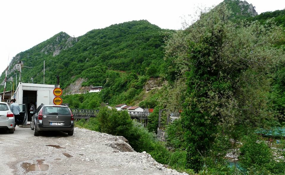 Српски (ћирилица): Hum-Šćepan Polje granični prelaz